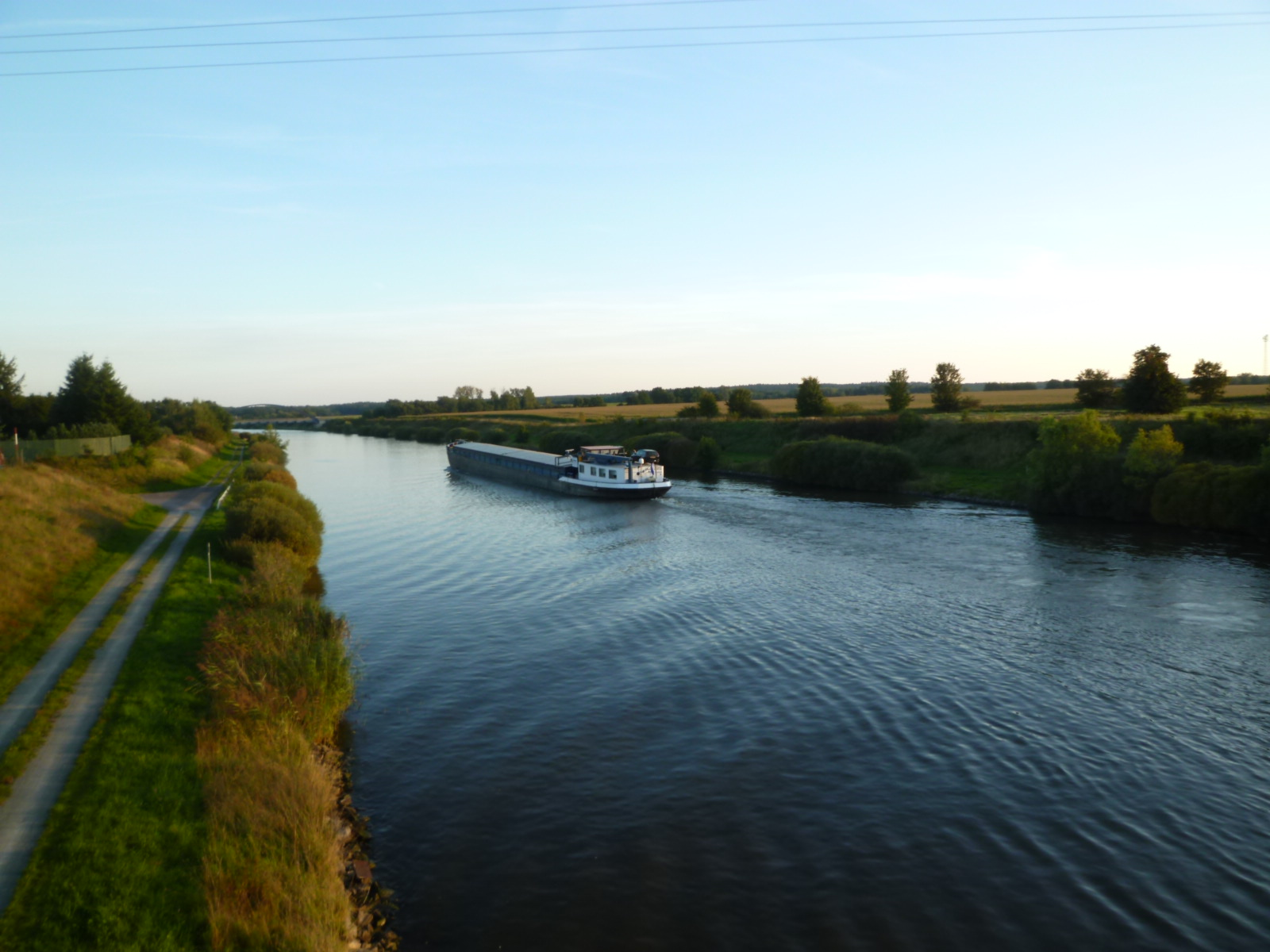 Der Mitrtellandkanal bei Calvörde